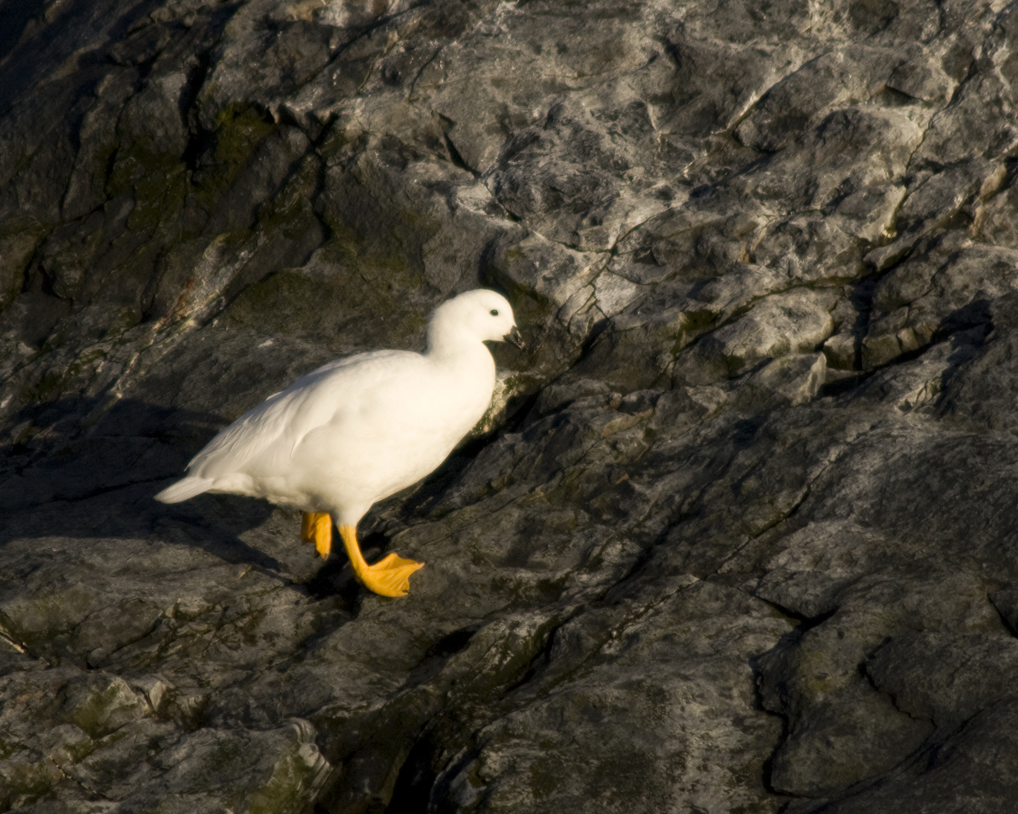 Kelp Goose (Chloephaga hybrida)